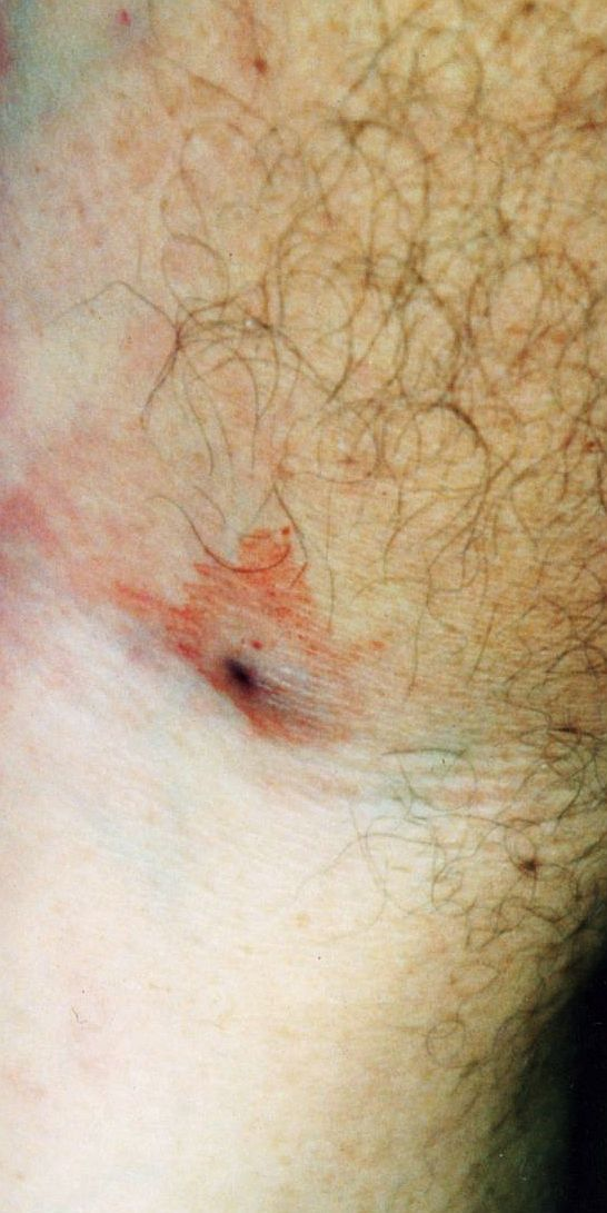 Venopunció recent al braç (catèter), amb hematoma circundant.